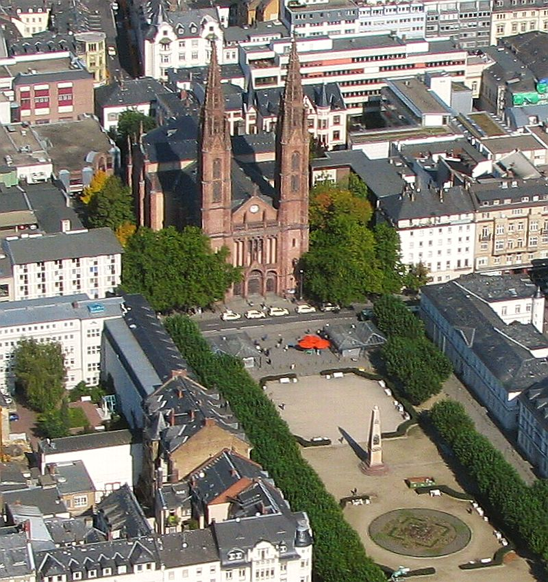 Wiesbaden Luftbild Luisenplatz St. Bonifatius-Kirche Foto 2008 Wolfgang Pehlemann Wiesbaden IMG_0172